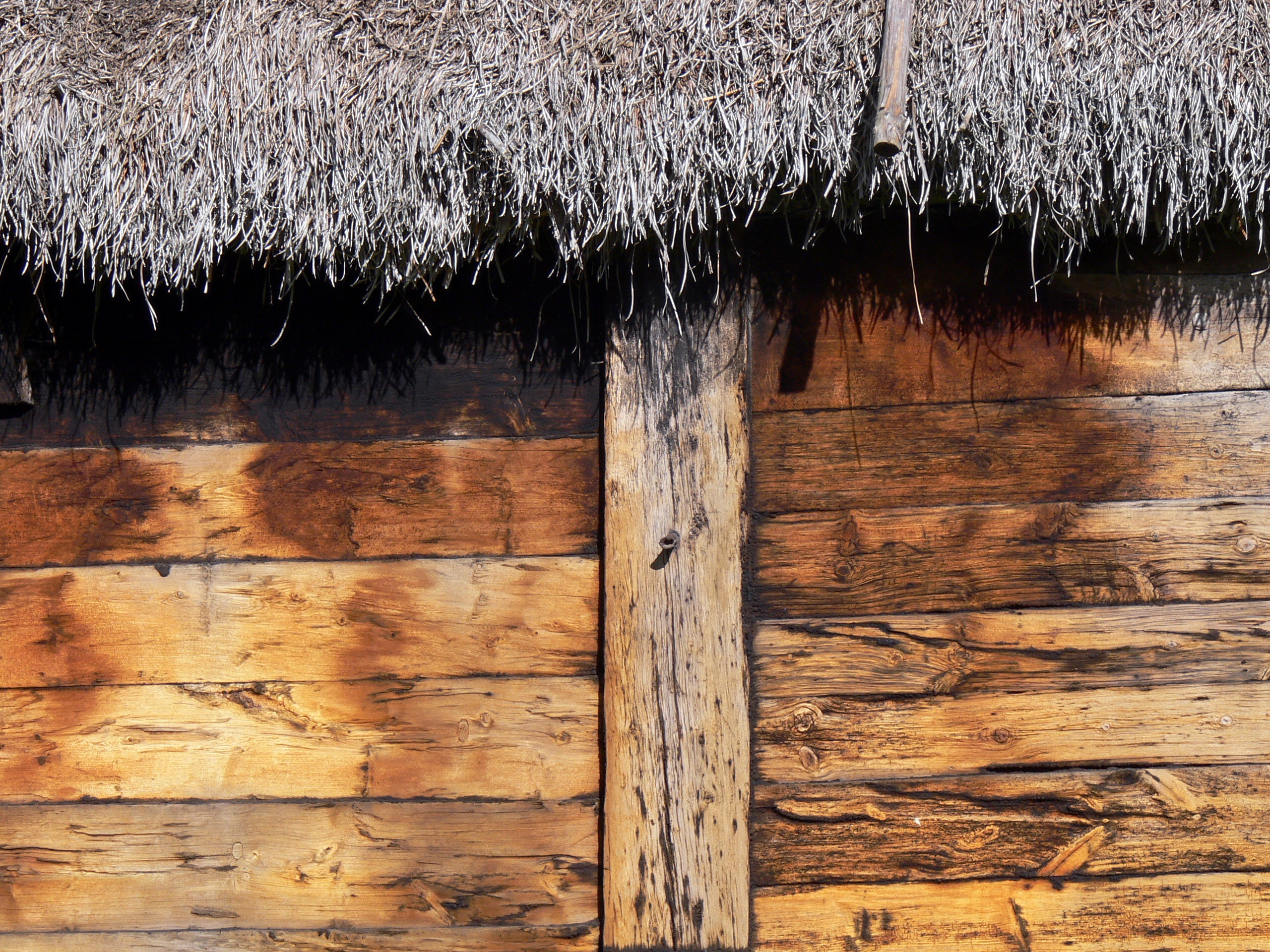 Bunge Museum auf Gotland. Hof ( 17.Jhdt. ): Blockbauweise